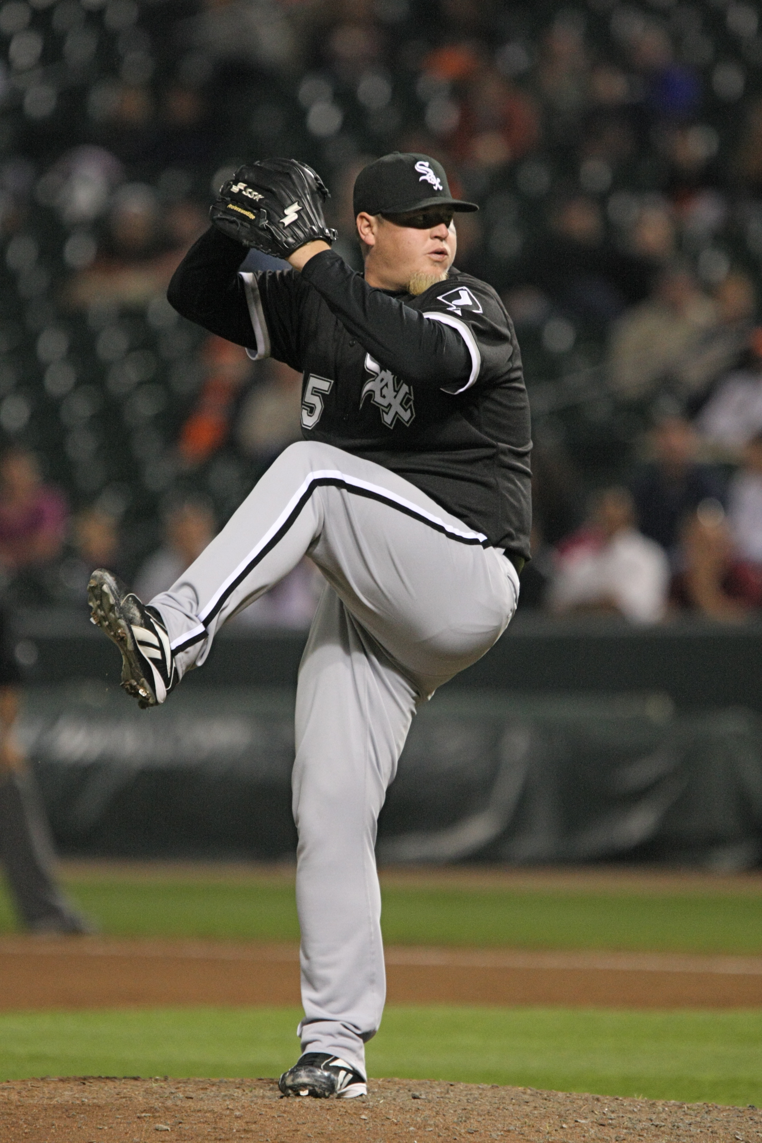 Bobby Jenks